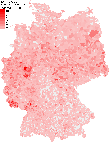 Verteilung des Nachnamens Hoffmann in Deutschland nach dem Telefonbuch mit Stand vom 6. Januar 2005 Source: selbst erstellt Ersteller: W. Baumgartner